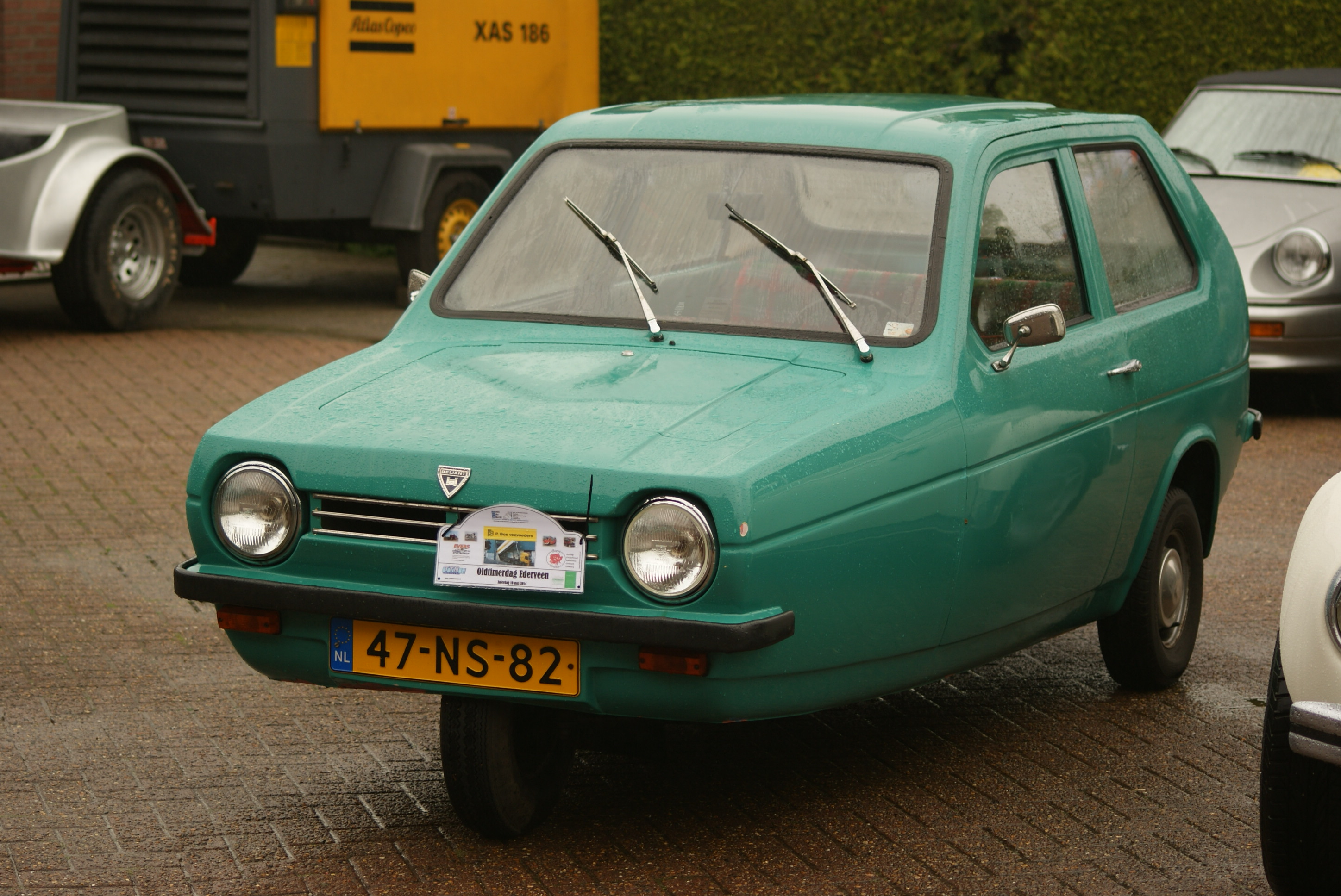 47-NS-82 Oldtimerdag Ederveen 2014